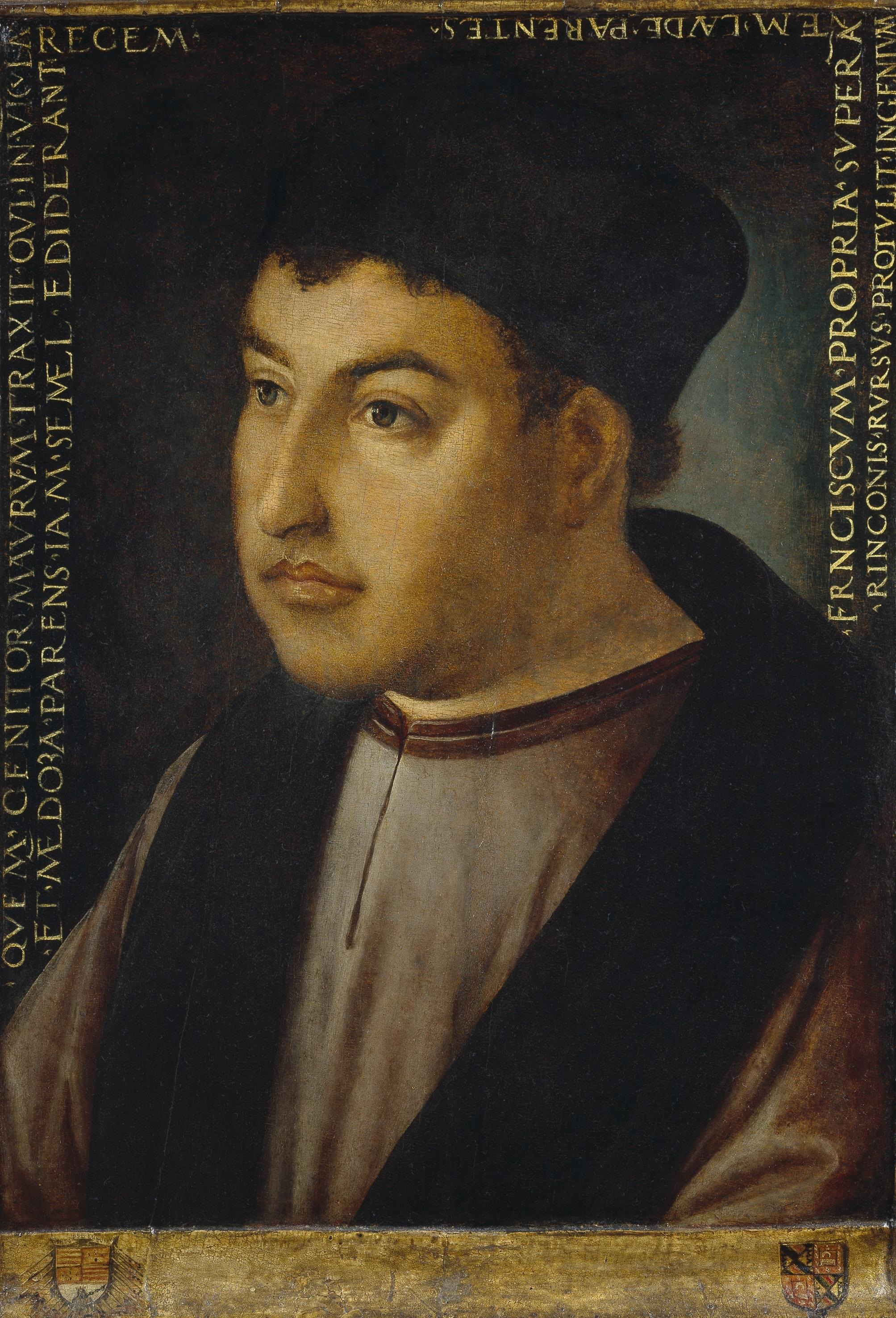 Retrato del prelado español Francisco Fernández de Córdoba y Mendoza († 1536), que llegó a ser obispo de Oviedo, de Zamora y de Palencia, comisario general de Cruzada y presidente del Consejo de Hacienda.